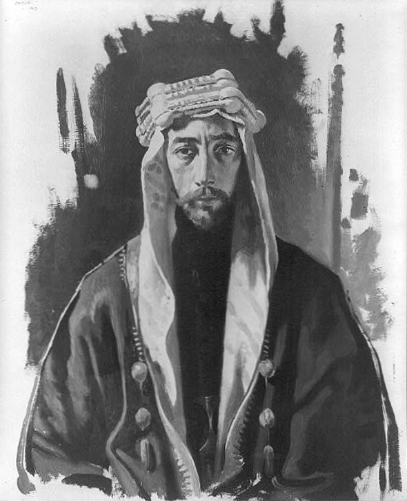 El emir Faisal, rey de Iraq.